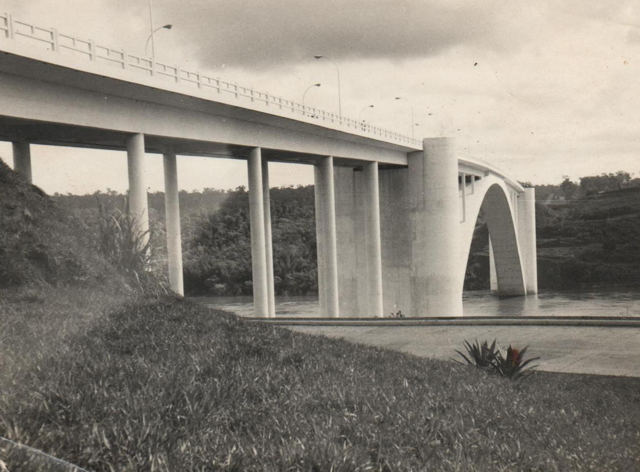 El Puente de la Amistad que conecta las ciudad de Foz do Iguaçu (Brasil) con Ciudad del Este (Paraguay) en el año 1965. Archivo de la familia Unternahrer.